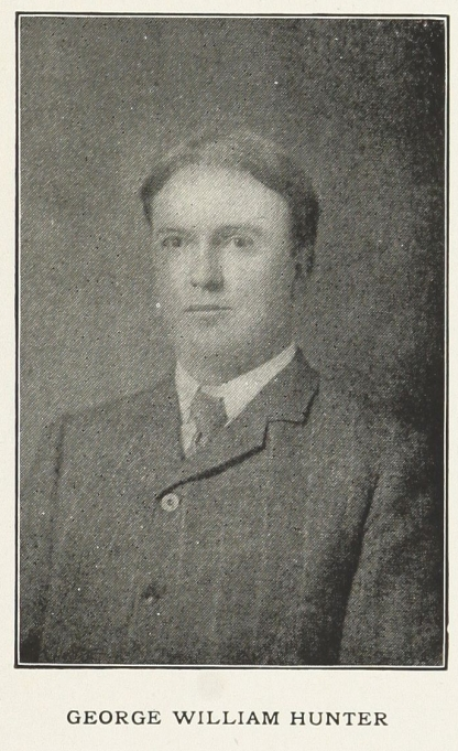 George William Hunter